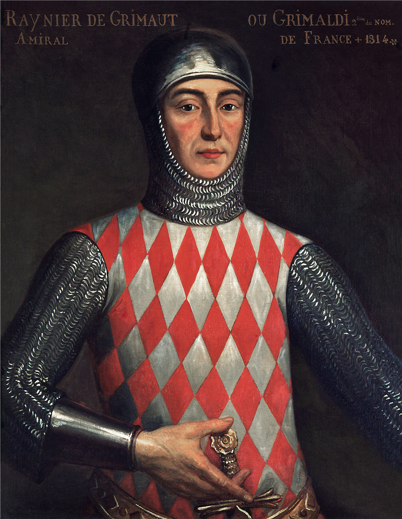 Raniero I de Gagnes (1267–1314), fundador de la dinastía Grimaldi.